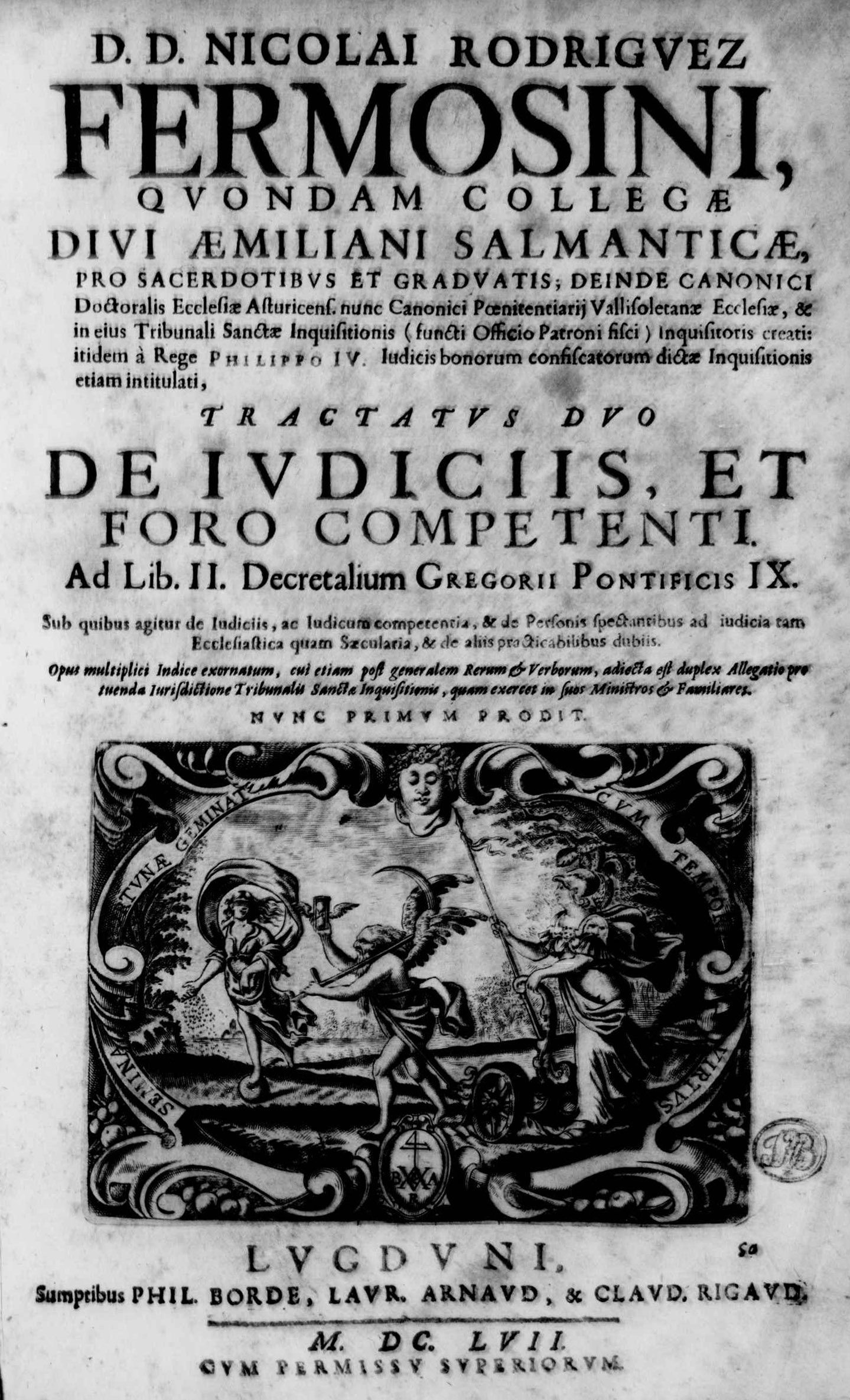 Frontespizio